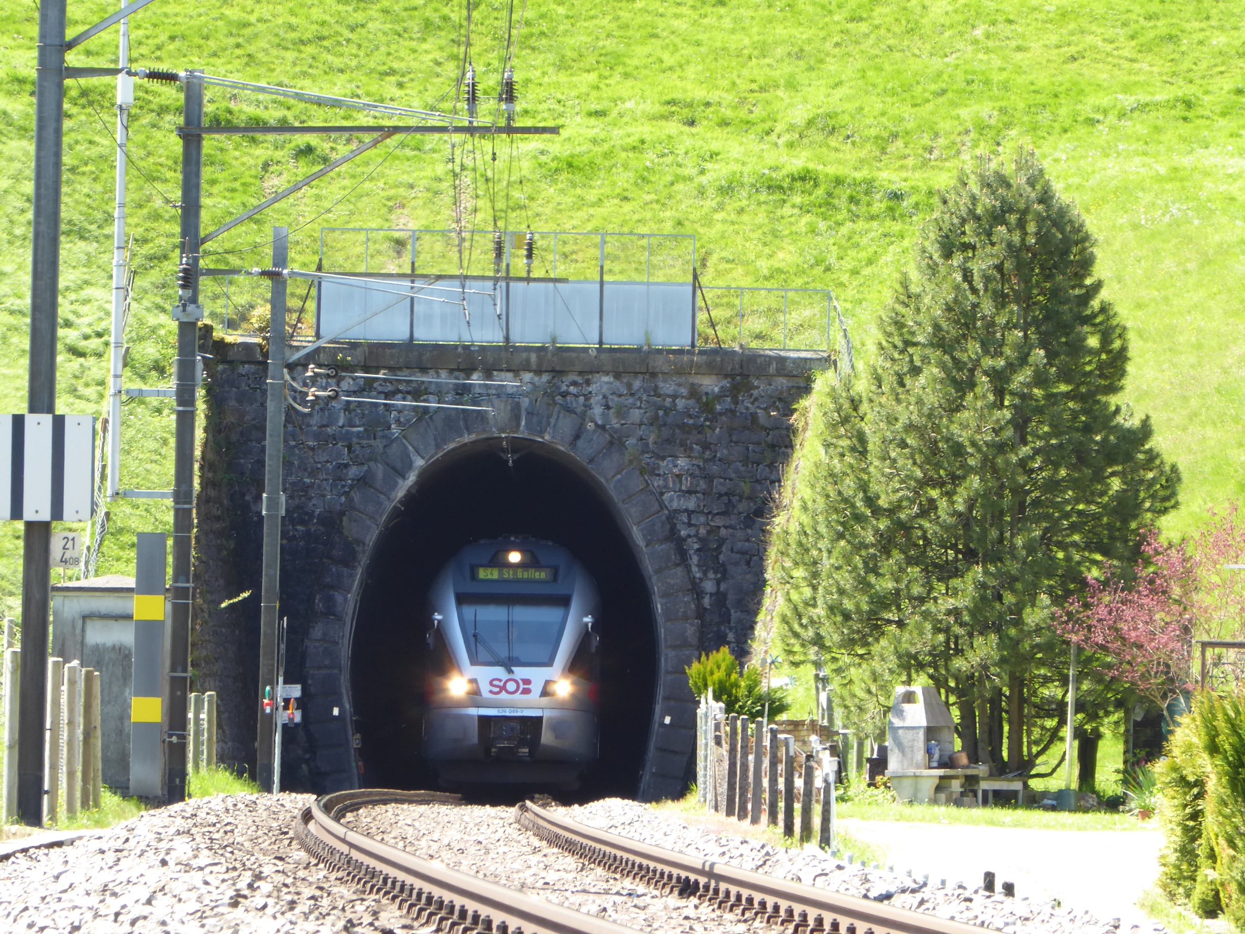 Portal des Rickentunnels bei Wattwil mit einem RABe 526 der SOB (Flirt)